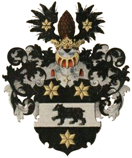 Baer Edle von Huthorni suguvõsa aadlivapp